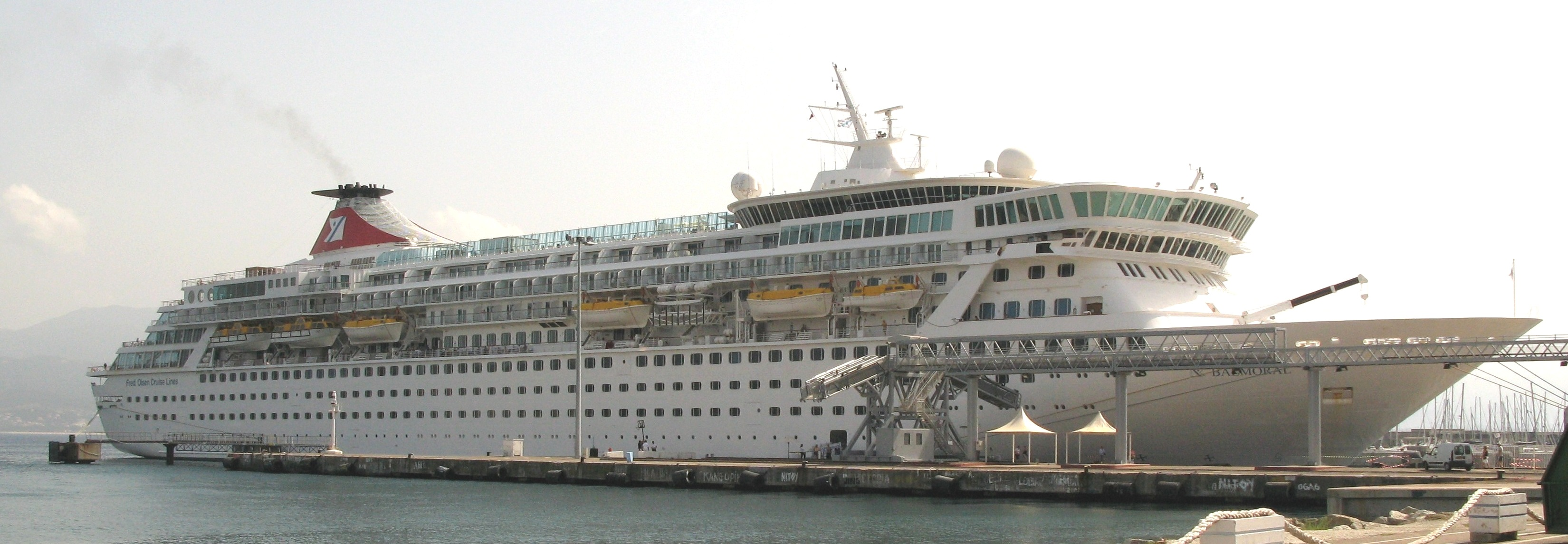 Le Balmoral au port d'Ajaccio